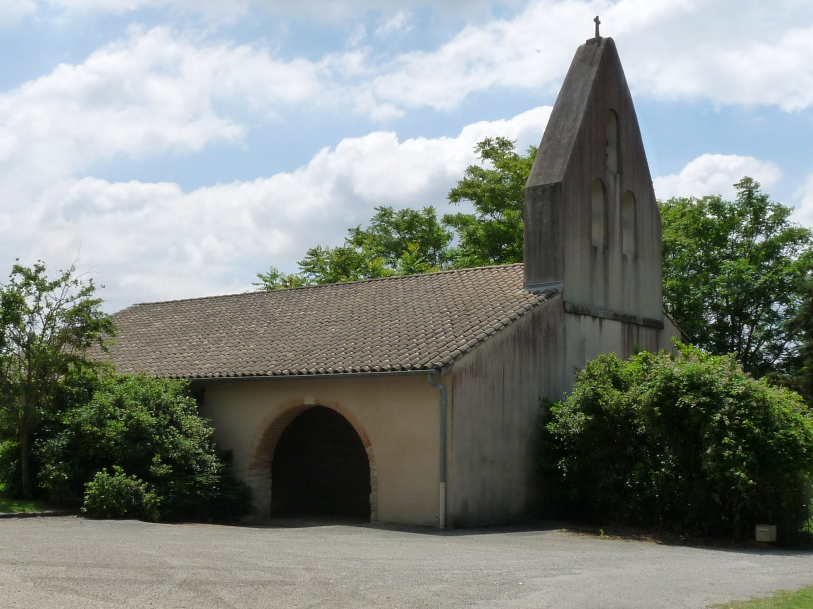 Eglise d'Albiac, Haute-Garonne, France